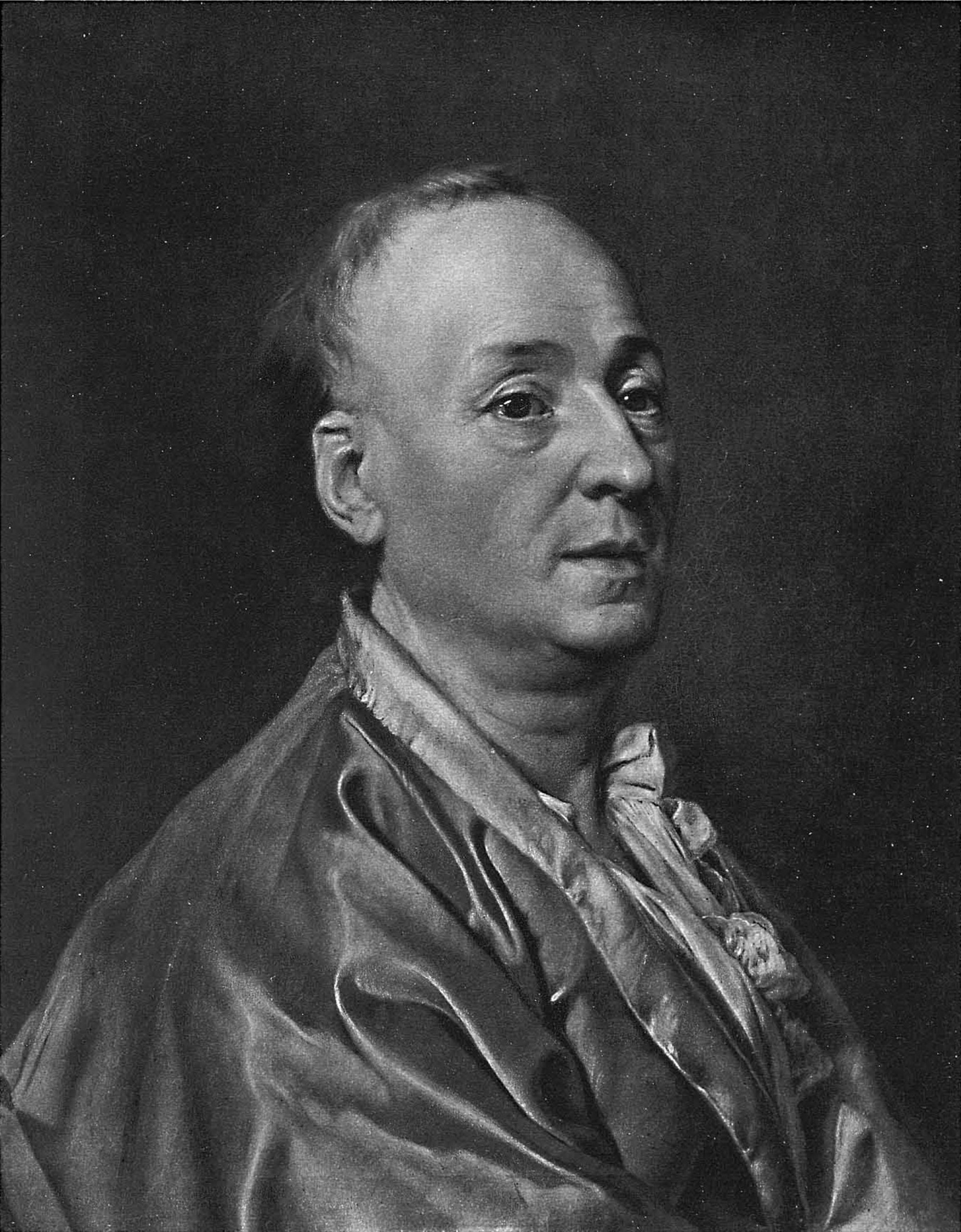 Дени Дидро (1713-1784)